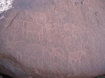 Gravures dans le Hoggar